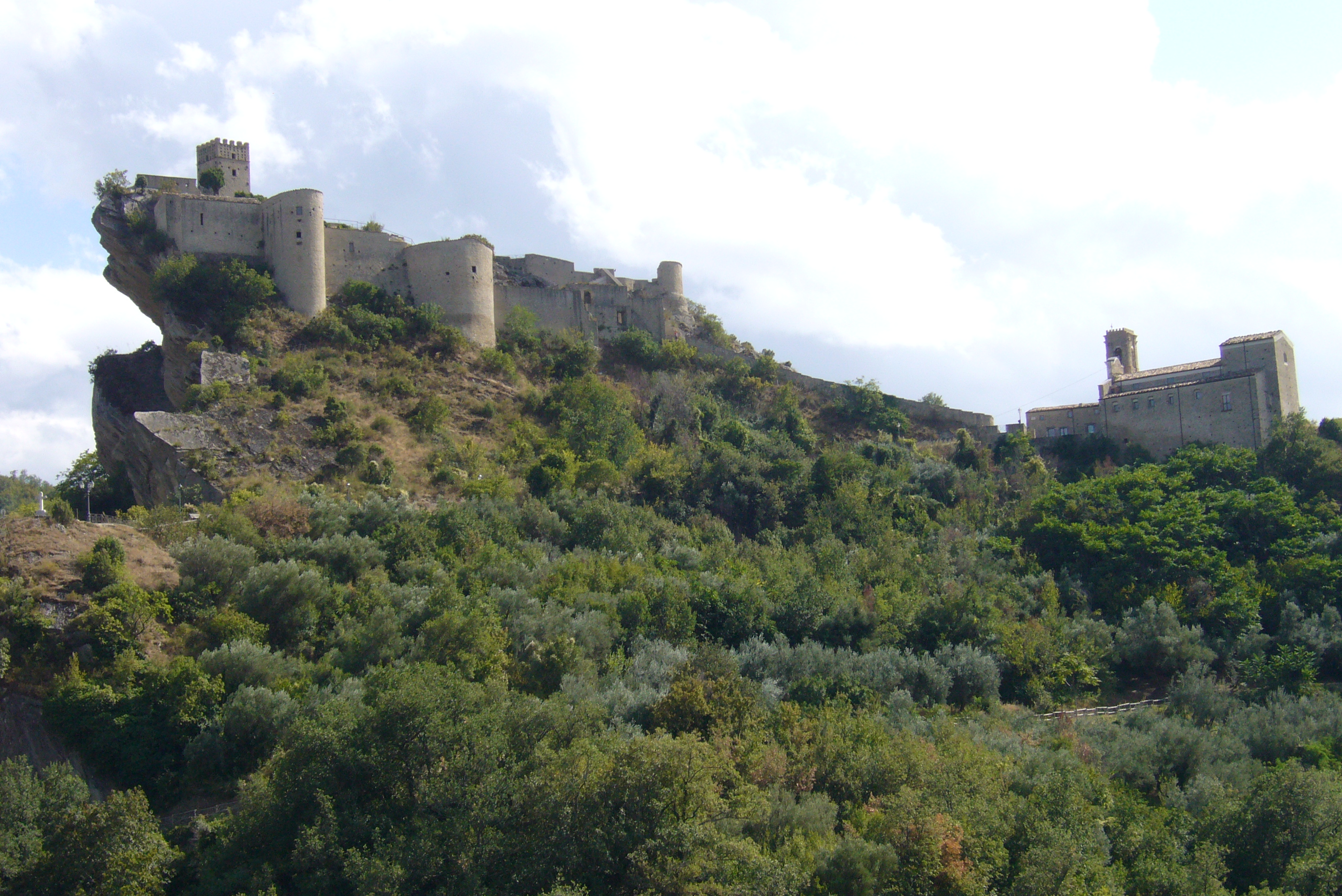 Castello e chiesa